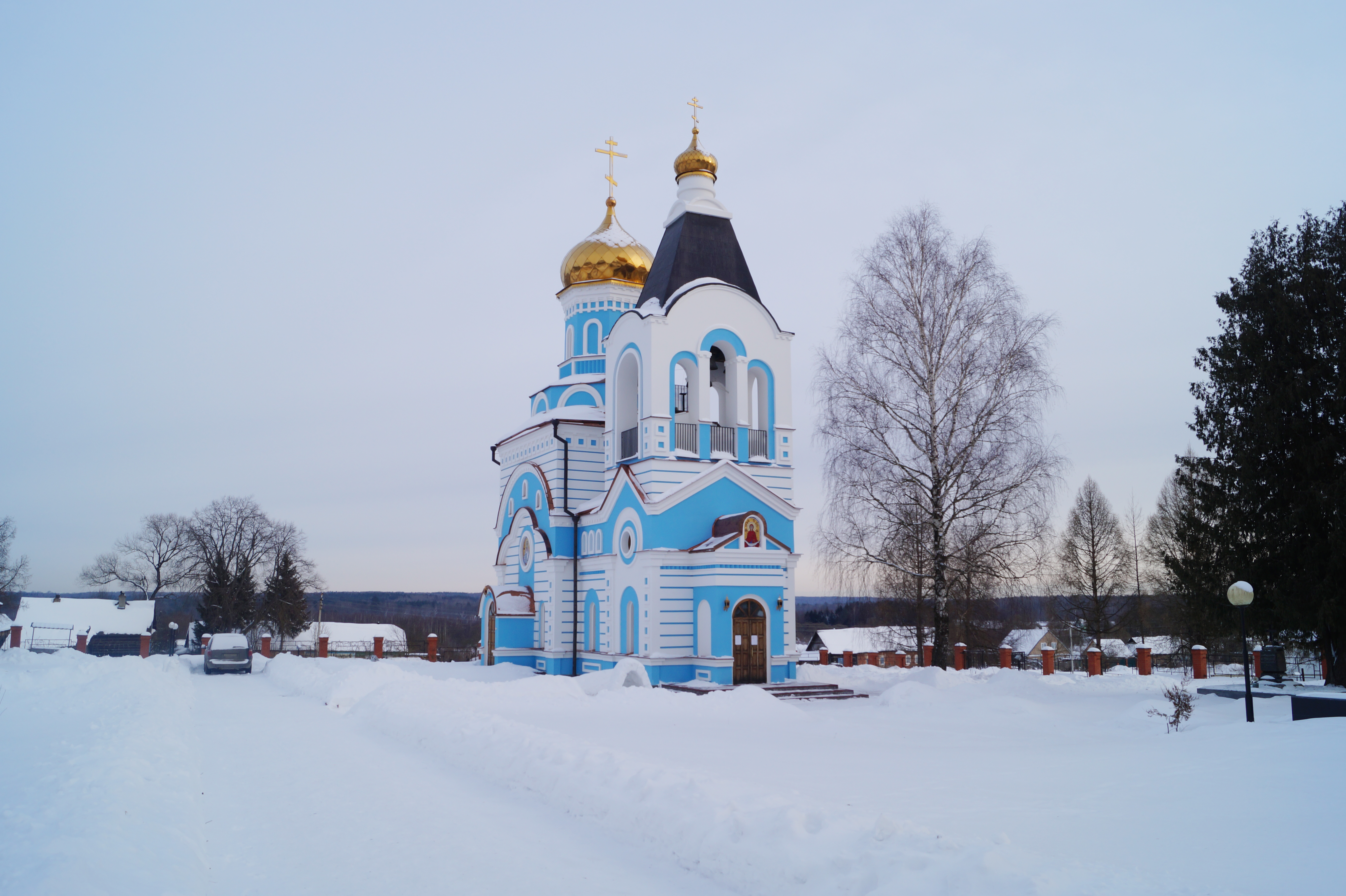 Хотьково (Думиничский район), храм